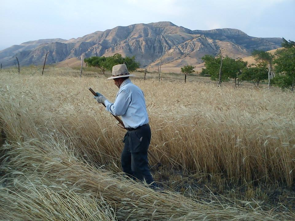 برداشت گندم ديم از مزارع روستاي خان كندي گرمي